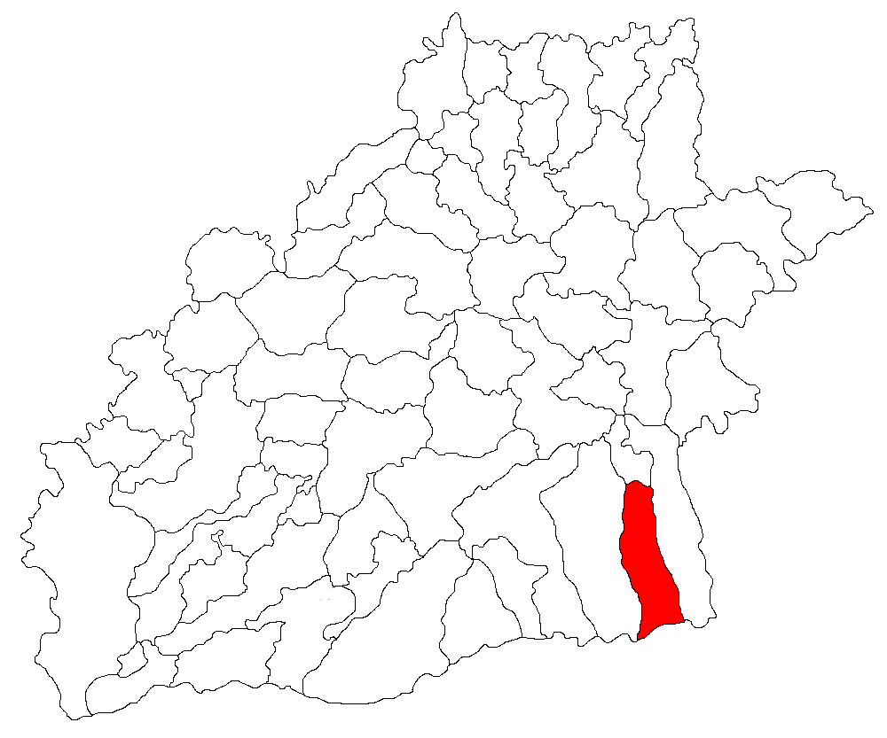 Categorie:Hărţi ale judeţului Sibiu